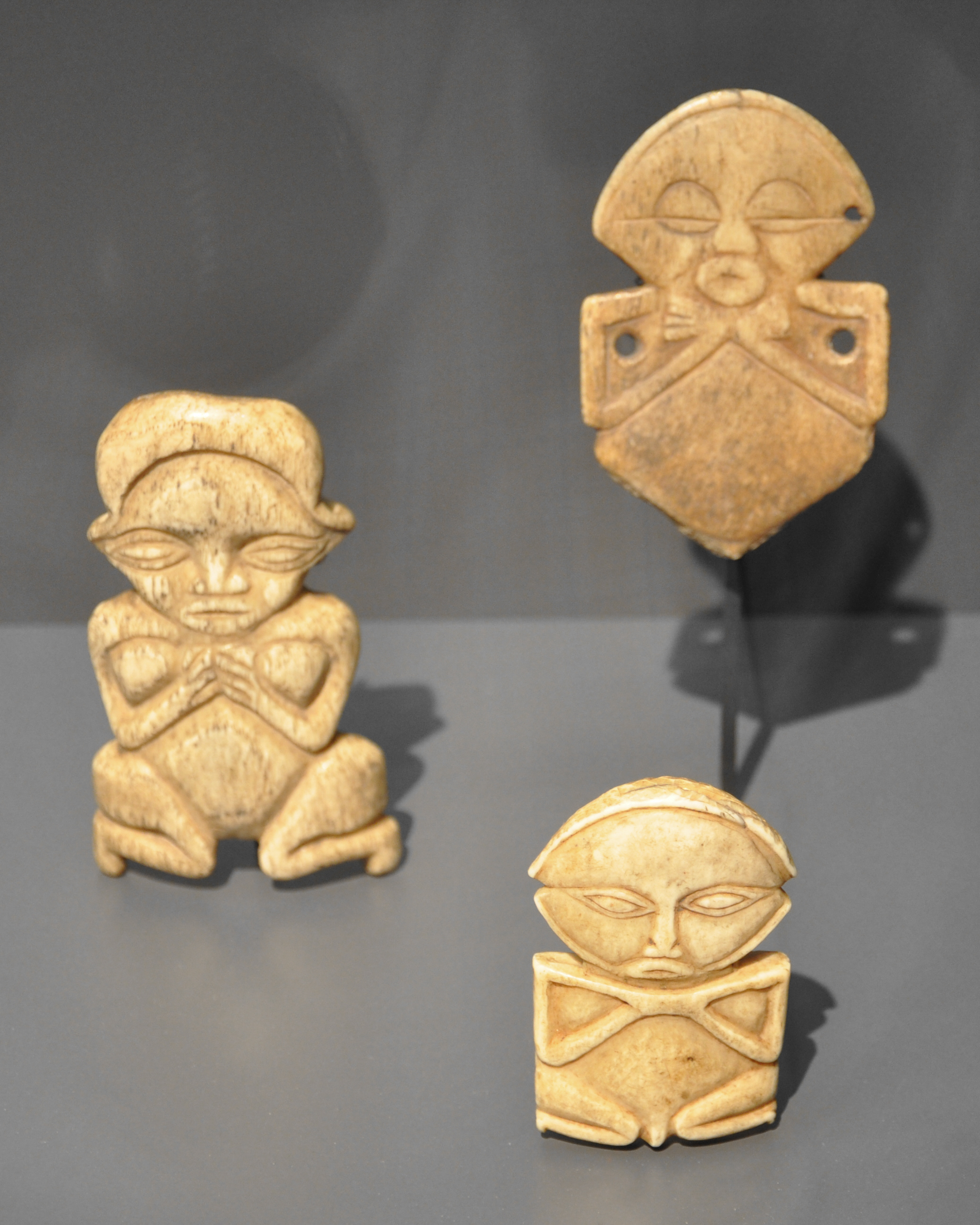 Amulette, Werkstätten der Hungan-Region, Dem. Rep. Kongo; 19. Jahrhundert; Elfenbein und Knochen Museum Rietberg, Zürich; Inv. Nr. RAC 262, 229, 230, 231 (hier nur drei davon abgebildet)